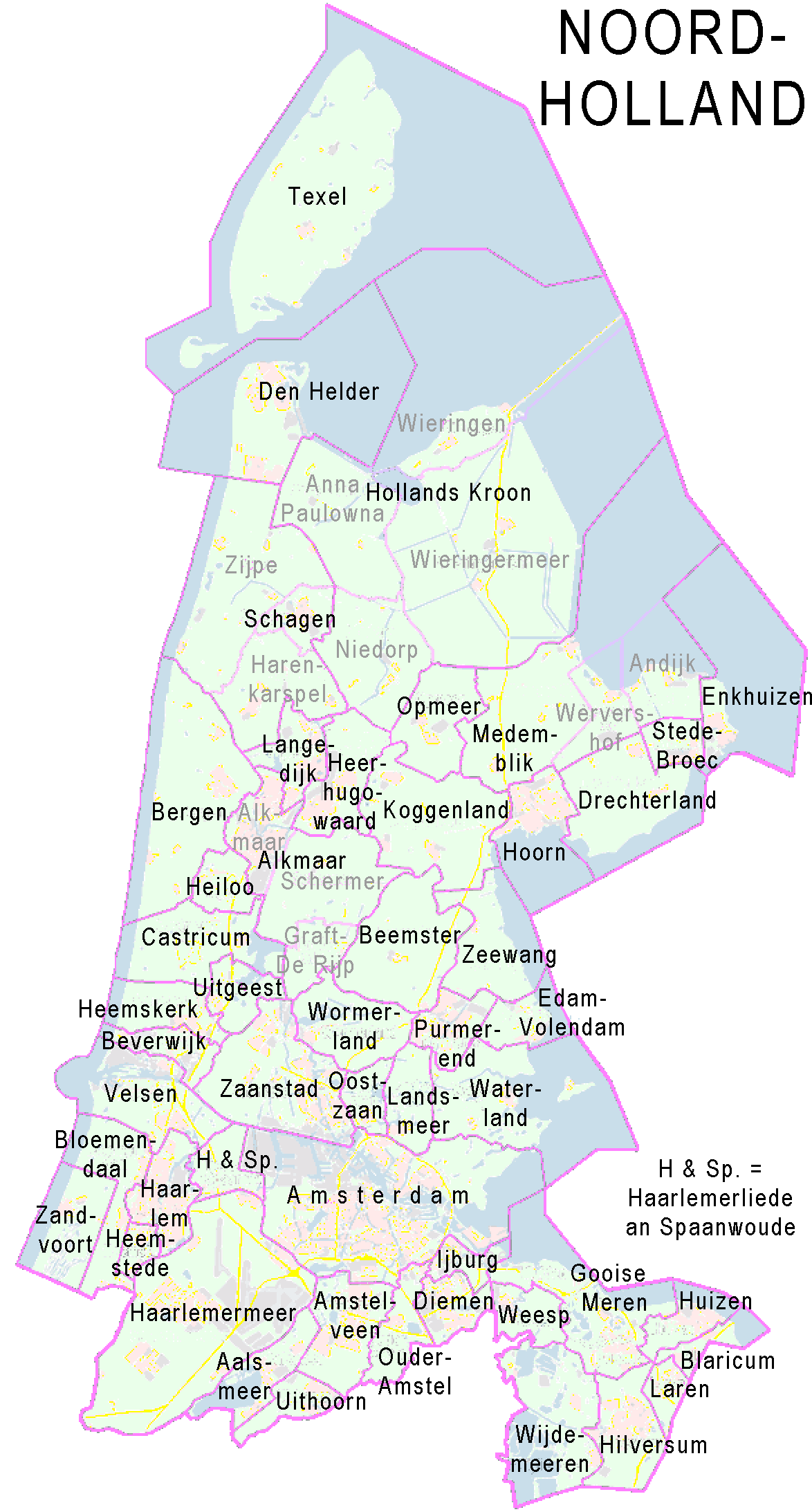 Provincie Noord-Holland, met indeling van gemeenten (2010). Door Jan-Willem van Aalst, samengesteld uit publiek beschikbare geo-data: Referentie-ondergrond (kustlijn, steden, wegen) gerasterd uit de OpenStreet Map OSM. ( Inhoud is beschikbaar onder de Creative Commons Attribution-ShareAlike 3.0 license. Vectorgrenzen van gemeenten en regio's vrij ter beschikking gesteld met dank aan cartografen van brandweerregio's Hollands-Midden en IJsselland; gerasterd in Photoshop. Overige kenmerken op de kaart: eigen tekenwerk van Jan-Willem van Aalst, op basis van gerasterde gemeentegrenzen. Gemeenten geactualiseert van Ulamm